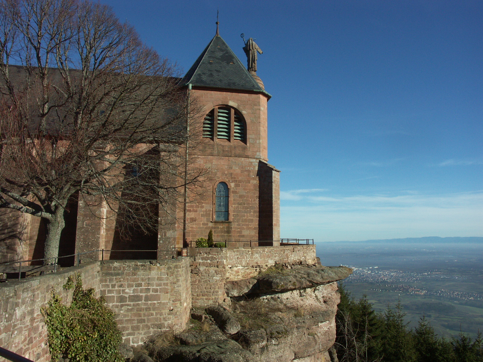 Mont Sainte-Odile, Alsace, France